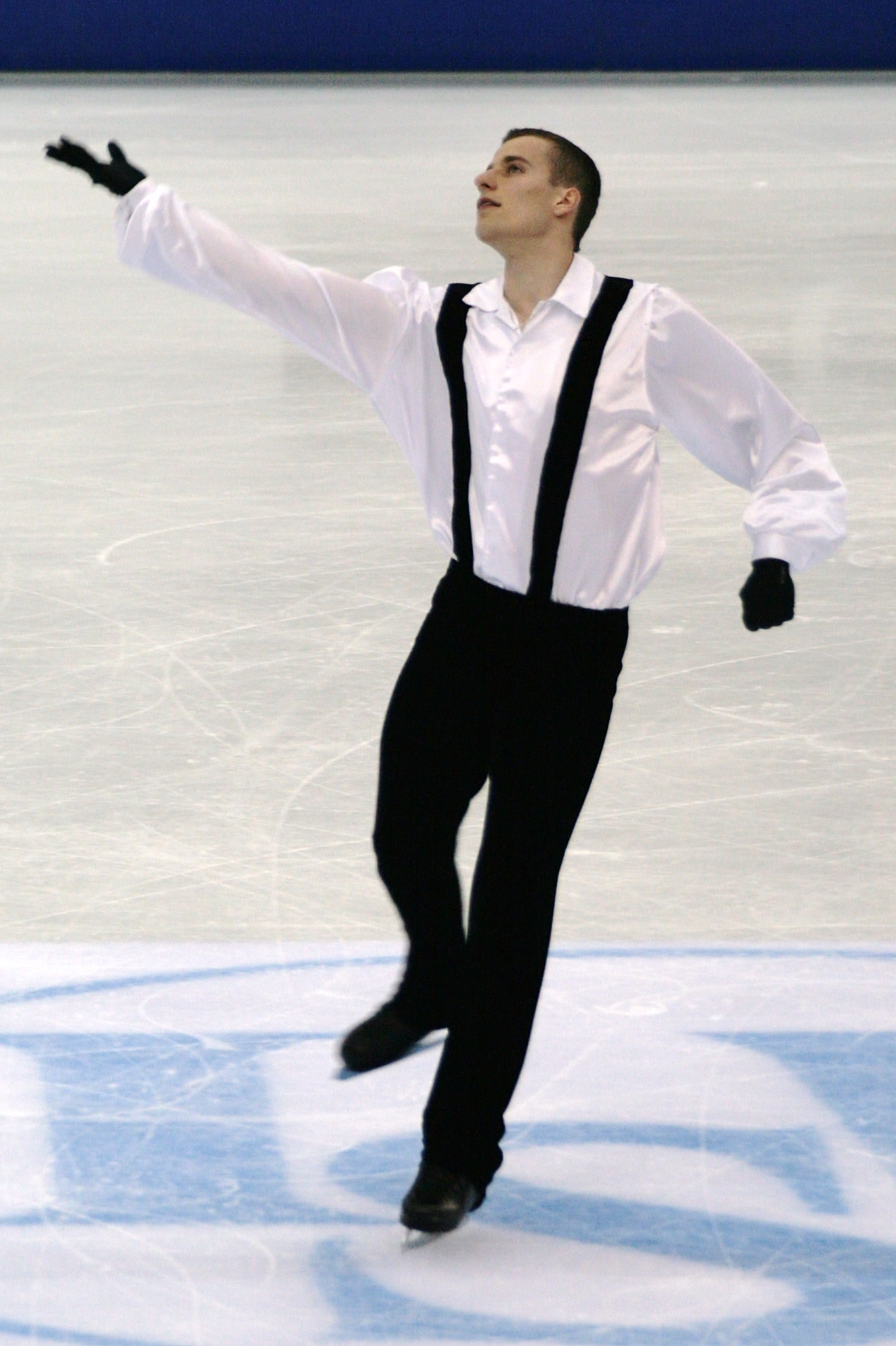 Мартон Марко (Венгрия) на чемпионате мира по фигурному катанию 2012